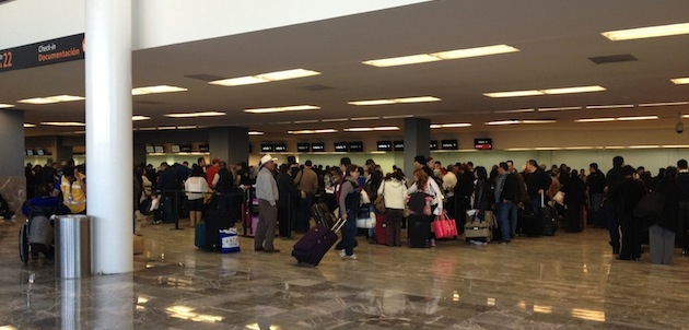 mostradores de volaris en el aeropuerto